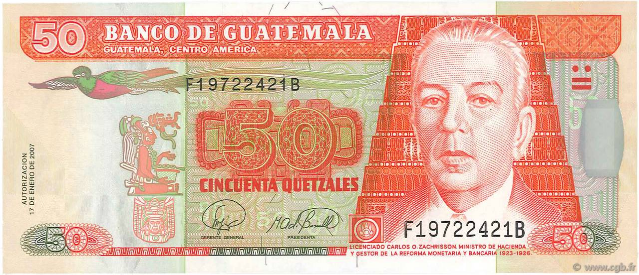 Billete de 50 Quetzales en Guatemala